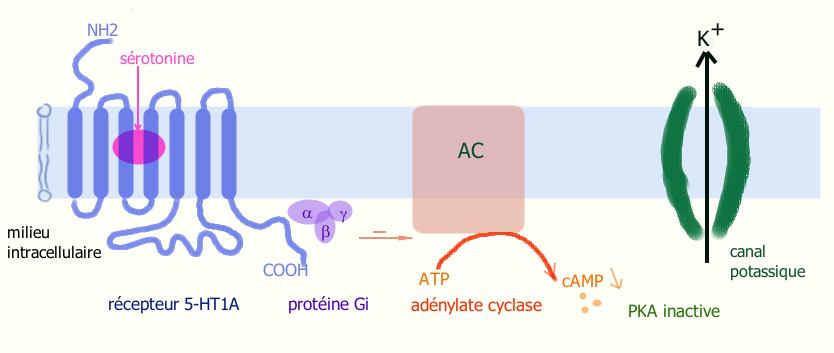 Récepteur sérotoninergiques 5-HT1A couplé à une protéine G